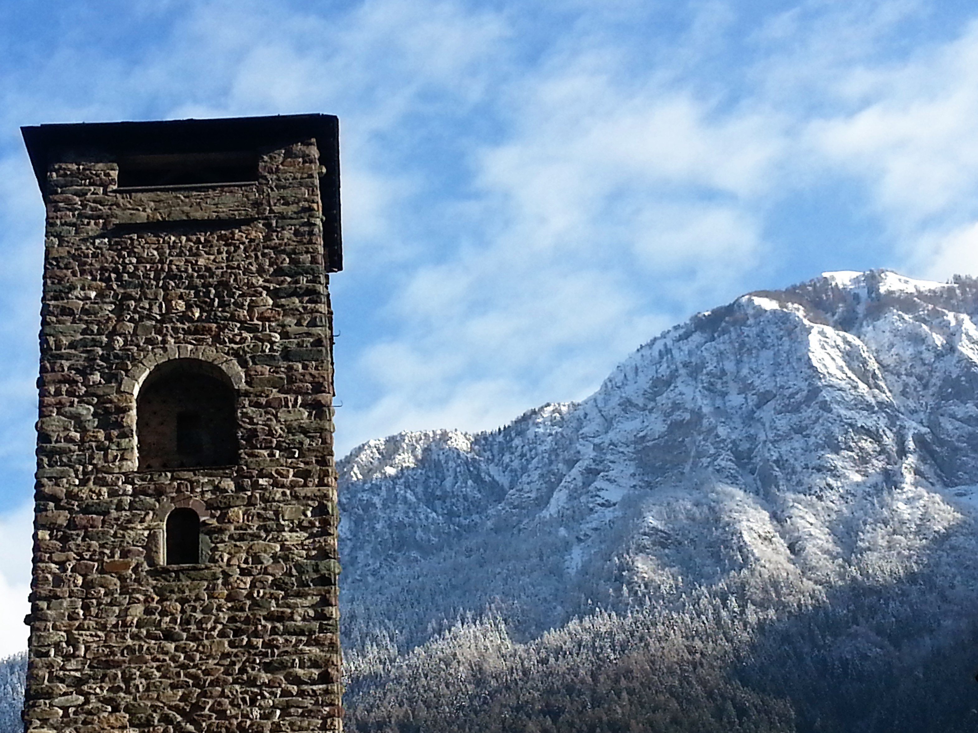 Particoalre della torre del castello Ginami Buccelleni con vista del monteRedondo